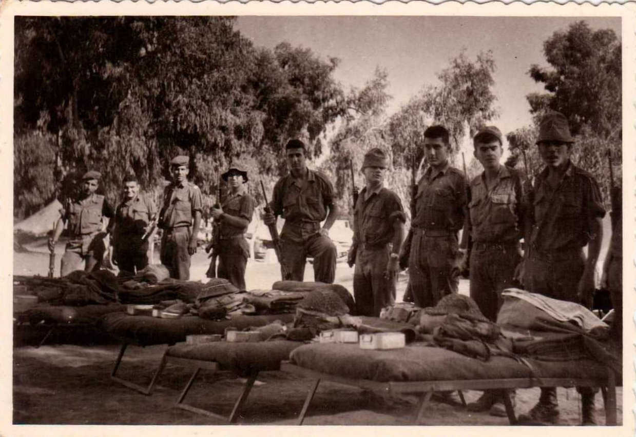 מסדר נוסף עם מיטות, טירונות במחנה 80, קיץ 1964